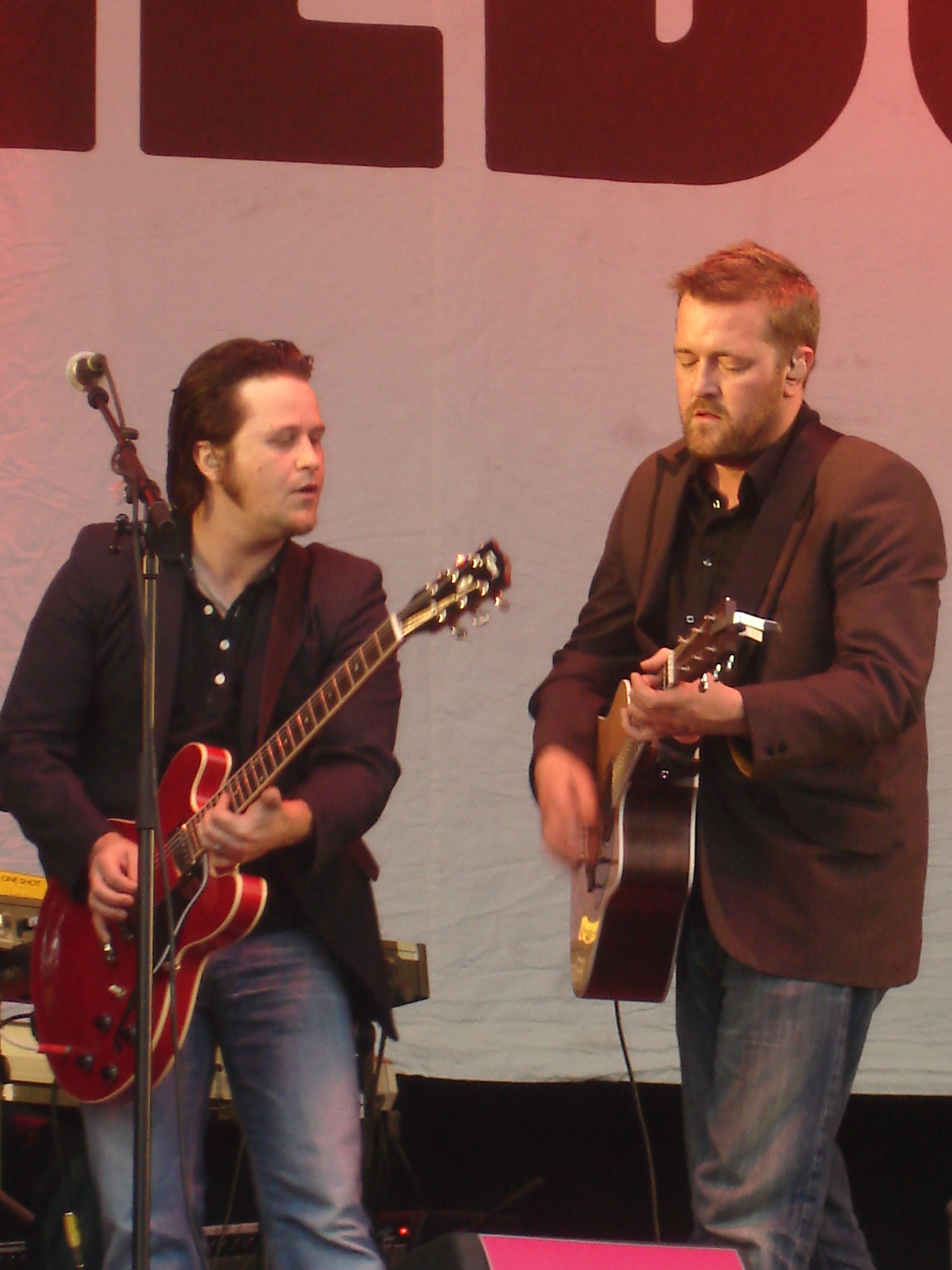 Elbow beim Hurricane-Festival 2006 auf der Bluestage